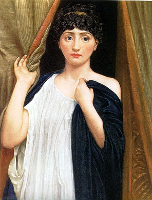 Cressida